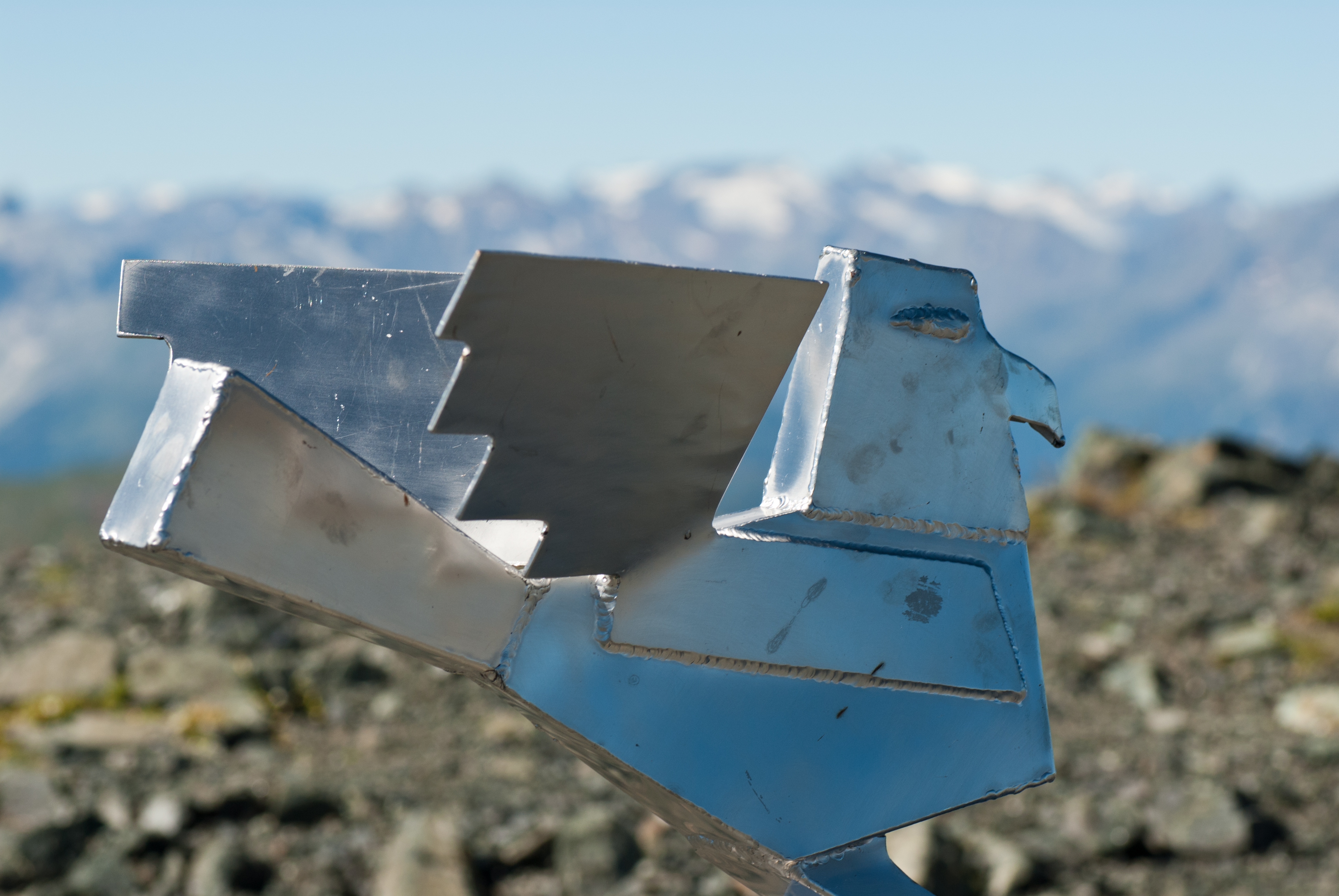 Geier-Gipfelzeichen am Gipfel des Geier in den Tuxer Alpen